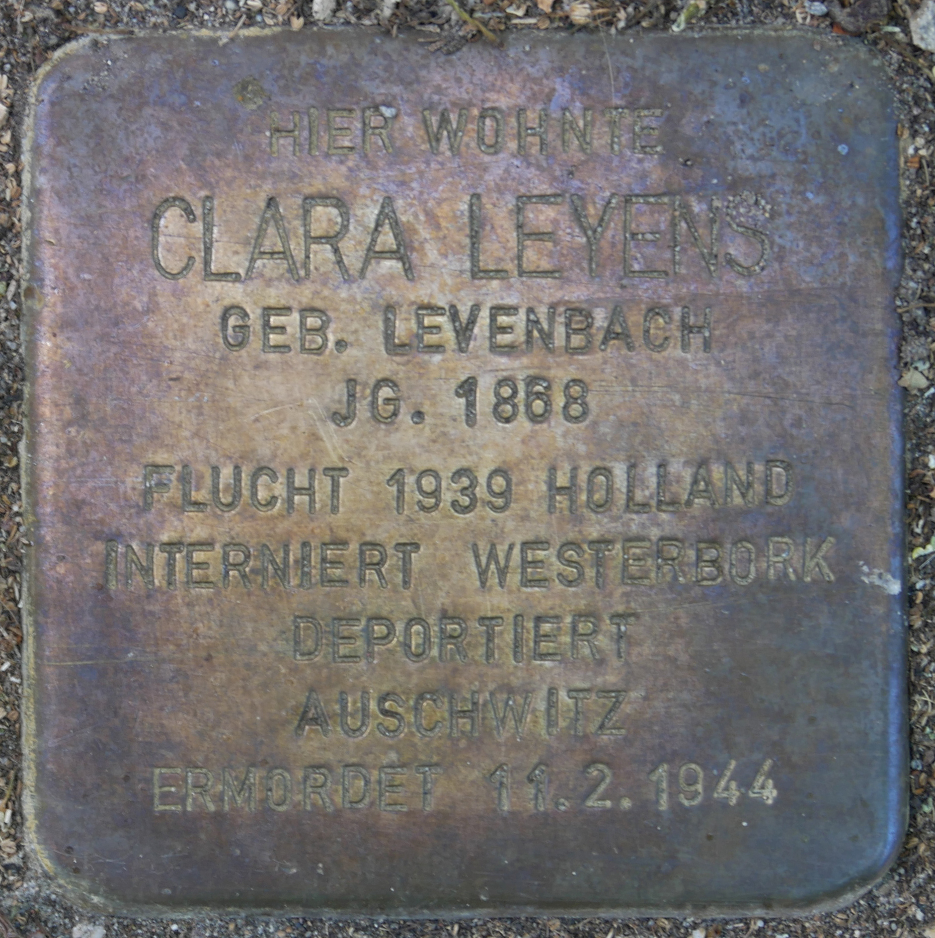 Stolpersteine Wesel: Leyens, Clara